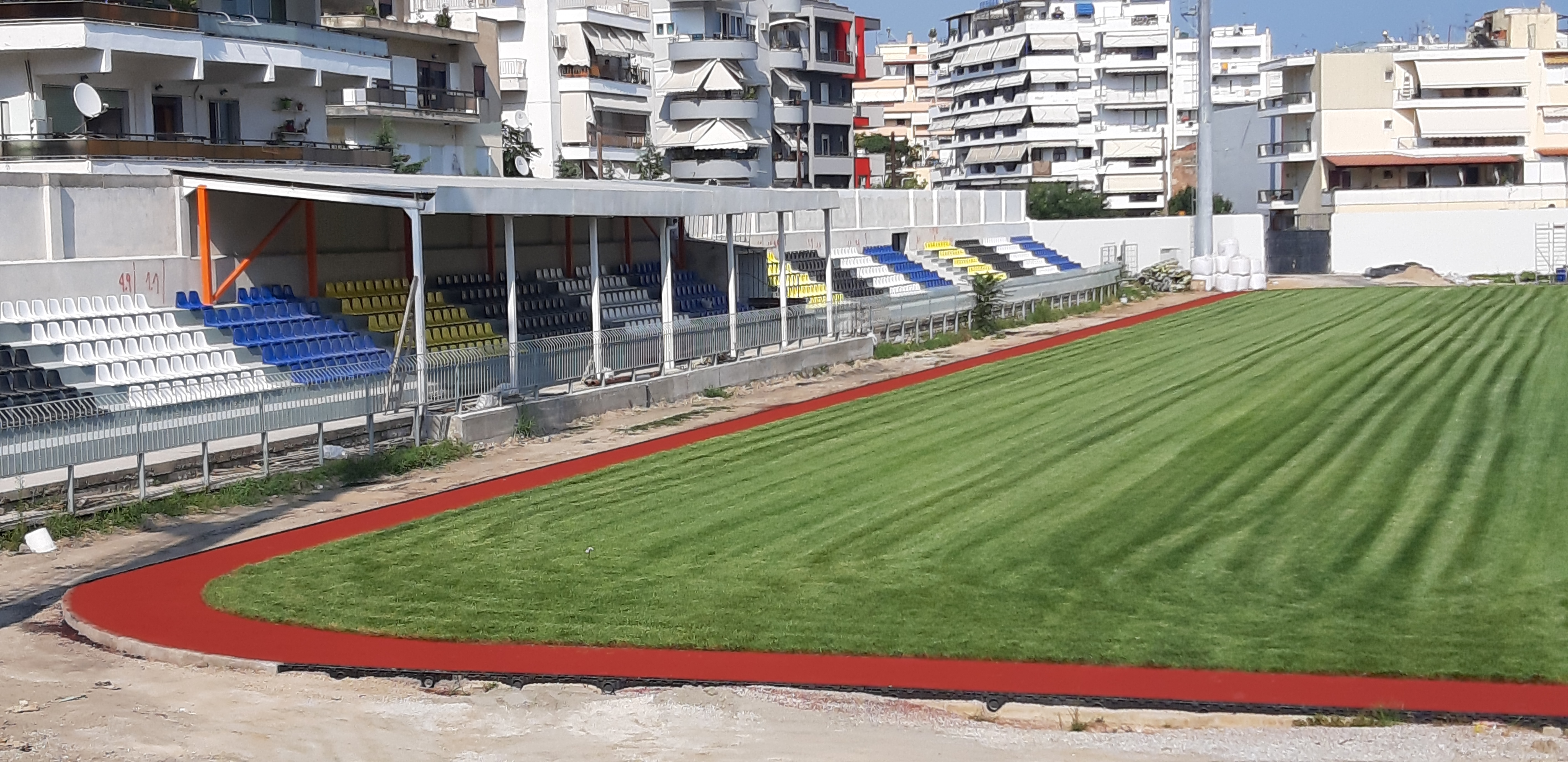 ΒΕΡΟΥΛΕΙΟ Δημοτικό Γήπεδο Καβάλας